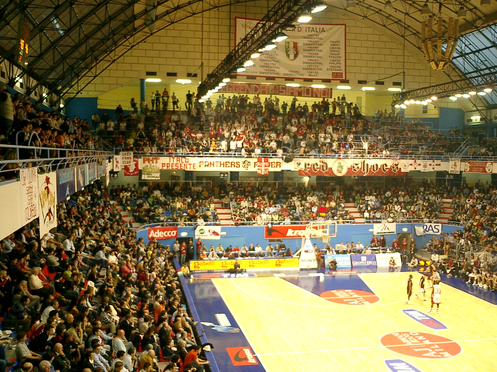 Il PalaLido di Milano nel marzo 2005.